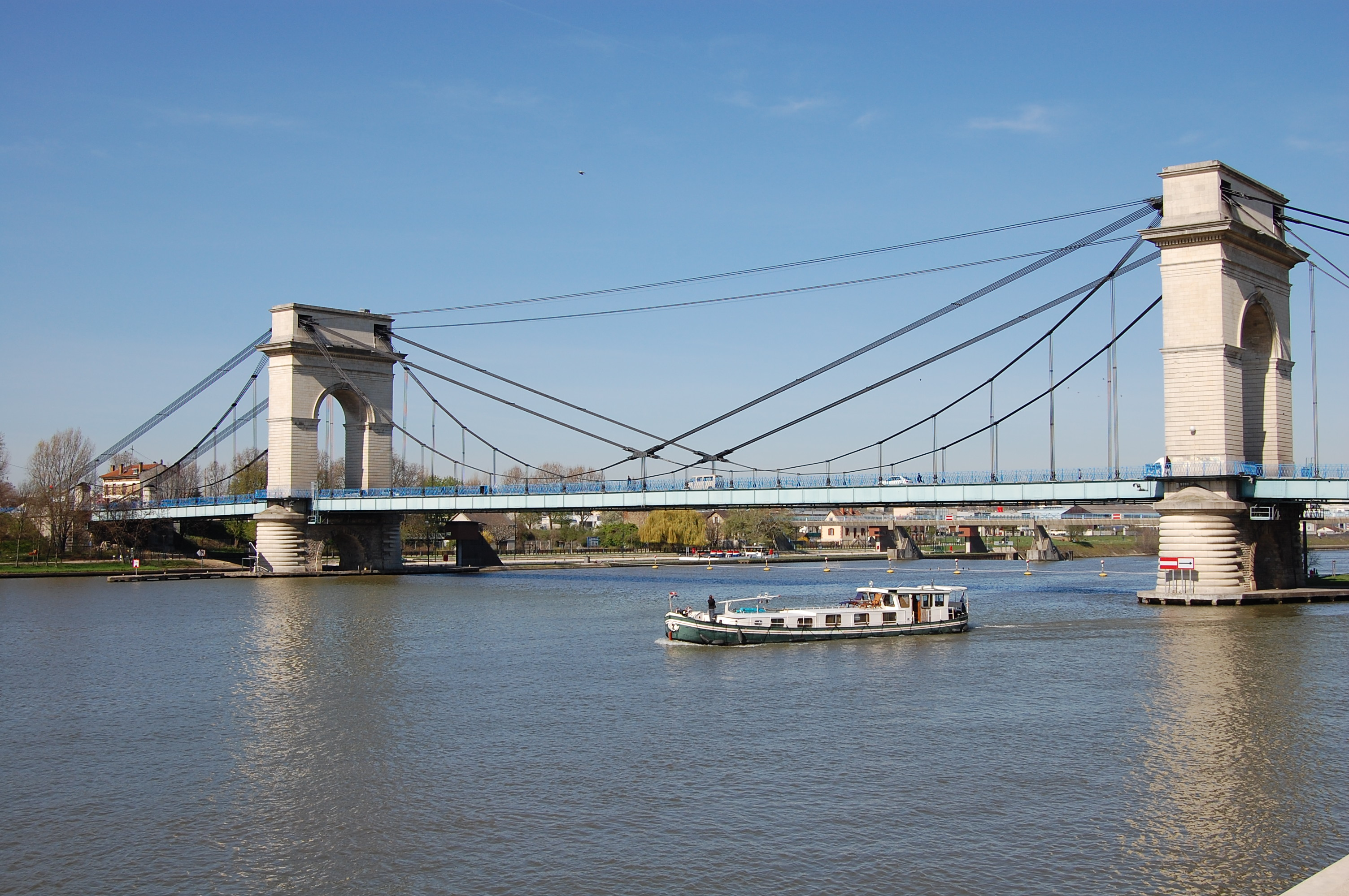 Ponte sospeso sulla Senna che collega Alfortville con Vitry-sur-Seine